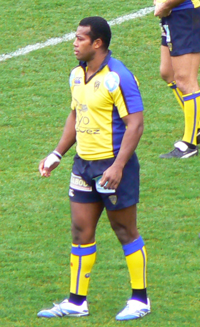 Le rugbyman fidjien Seremaia Baï avec l'ASM Clermont Auvergne affronte le SC Albi au Stade Marcel Michelin de Clermont-Ferrand.